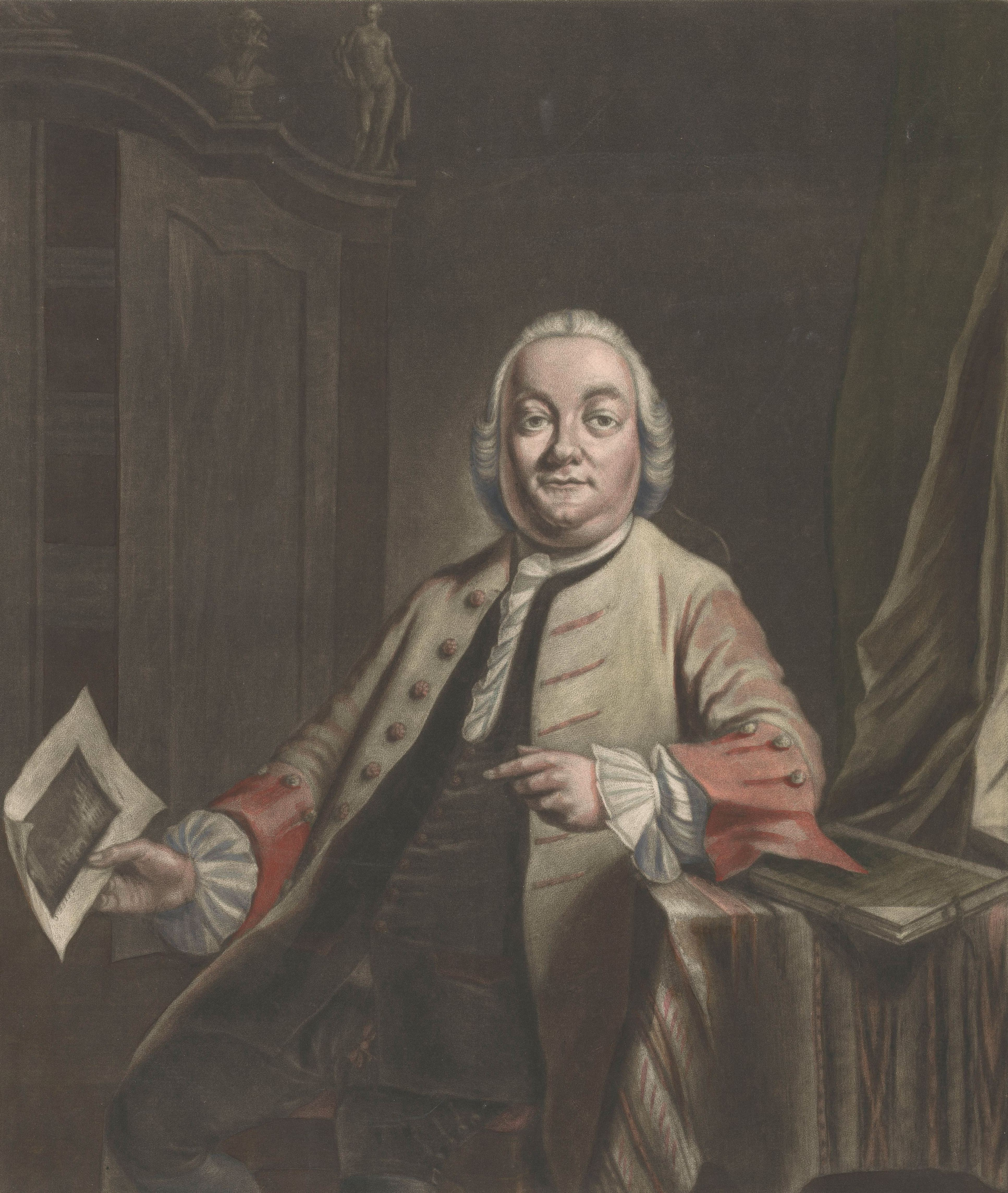 IdentificatieTitel(s): Portret van Simon Fokke met in zijn hand de prent van de plundering van het huis van Gerrit Hagedooren, 1751Objecttype: prent Objectnummer: RP-P-2015-26-1974Catalogusreferentie: FMH 4021-toegevoegd aanOpmerking: (toegevoegd nummer RPK)Wurzbach 2-1(2)FMP 1688Opschriften / Merken: verzamelaarsmerk, verso, gestempeld: Lugt 2228verzamelaarsmerk, verso, gestempeld: Lugt 4779verzamelaarsmerk, verso, gestempeld: Lugt 4780Omschrijving: Portret van de prentmaker Simon Fokke zittend aan een tafel. Hij houdt in zijn rechterhand een afdruk van de prent van de plundering van het huis van de wijnkoper Gerrit Hagedooren (Hagedoorn) in de Bierstraat te Rotterdam in de avond van 17 augustus 1751.VervaardigingVervaardiger: prentmaker: John Greenwood (vermeld op object)naar schilderij van: Jacobus Buys (vermeld op object)Plaats vervaardiging: Noordelijke NederlandenDatering: 1751 - 1792Fysieke kenmerken: mezzotint, met de hand gekleurd; proefdrukMateriaal: papier Techniek: mezzotint / met de hand kleurenAfmetingen: plaatrand: h 355 mm × b 285 mmToelichtingNiet in Frederik Muller; door het RPK toegevoegd nummer.OnderwerpWat: engraver, etcherWie: Simon FokkeVerwerving en rechtenCredit line: Legaat van de heer S. Emmering, AmsterdamVerwerving: legaat 2000Copyright: Publiek domein